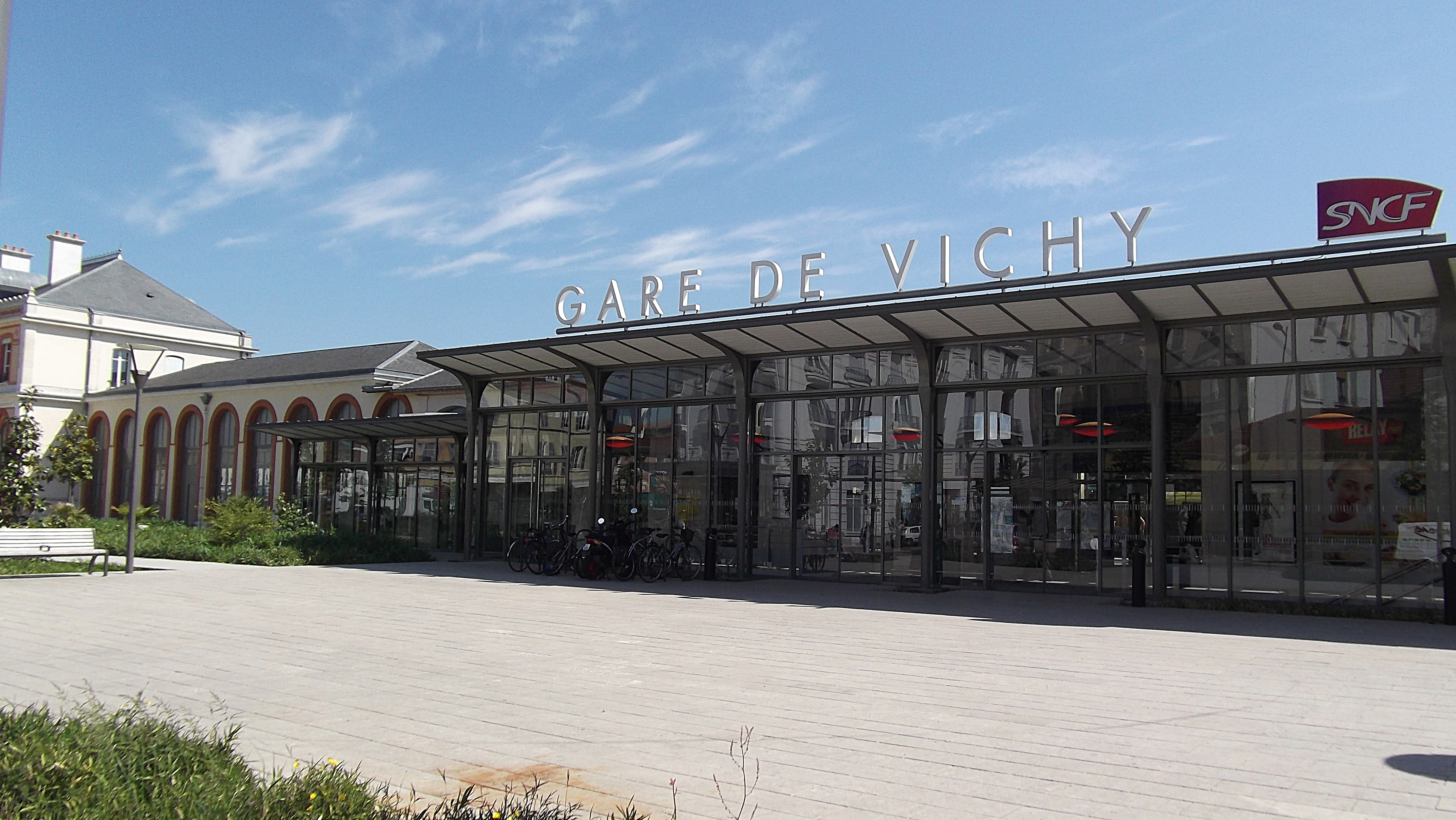 Gare SNCF de Vichy (Côté boutique).